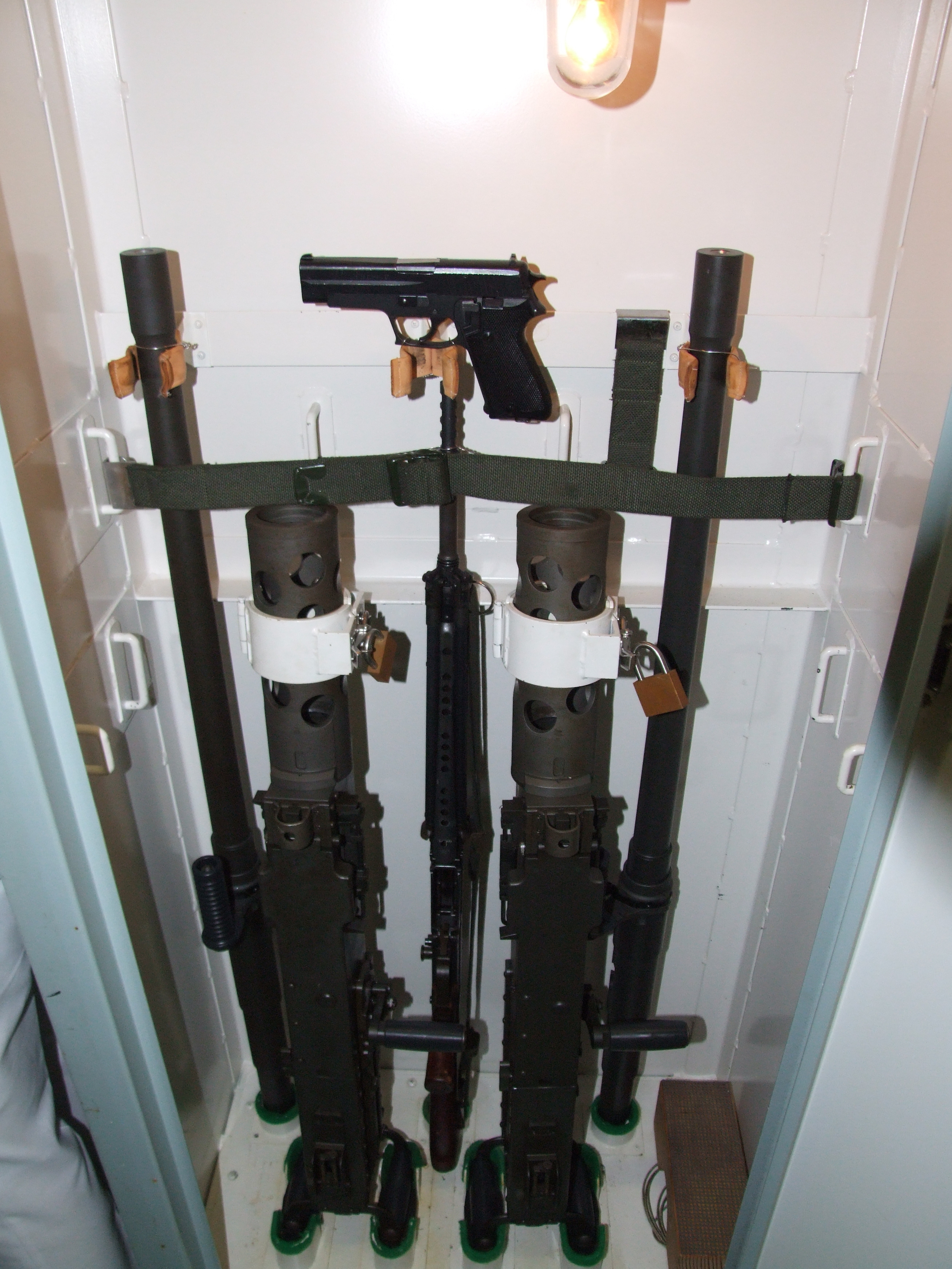 護衛艦しらゆきの武器庫。横浜港開港150年の艦内開放にて撮影。